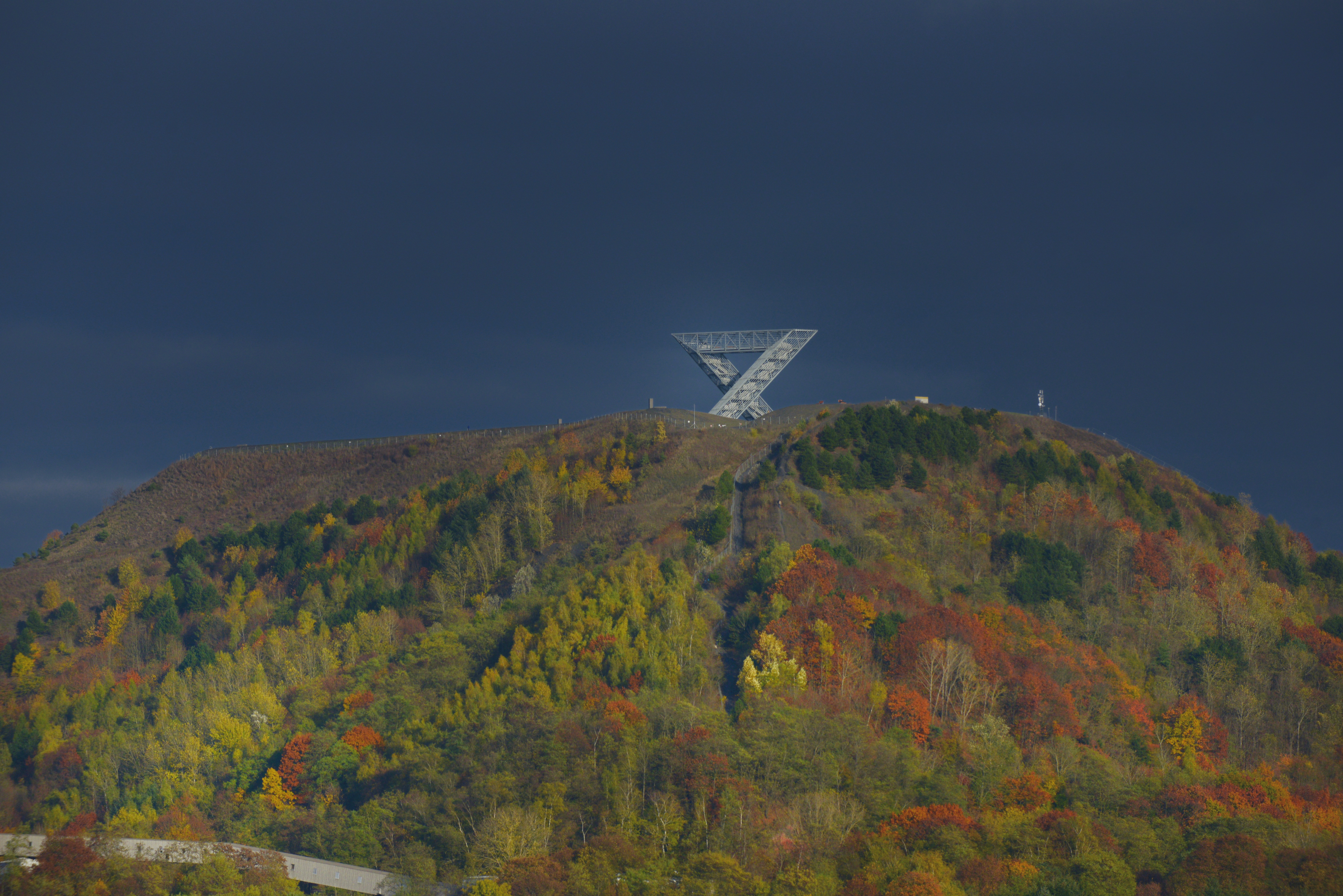 Das Saarpolygon auf der Bergehalde Duhamel in Ensdorf erinnert an die alte Bergbautradition im Saargebiet, blickt zugleich jedoch in die Zukunft. Die neue Landmarke im Saarland wurde am 16.09.2016 eingeweiht.